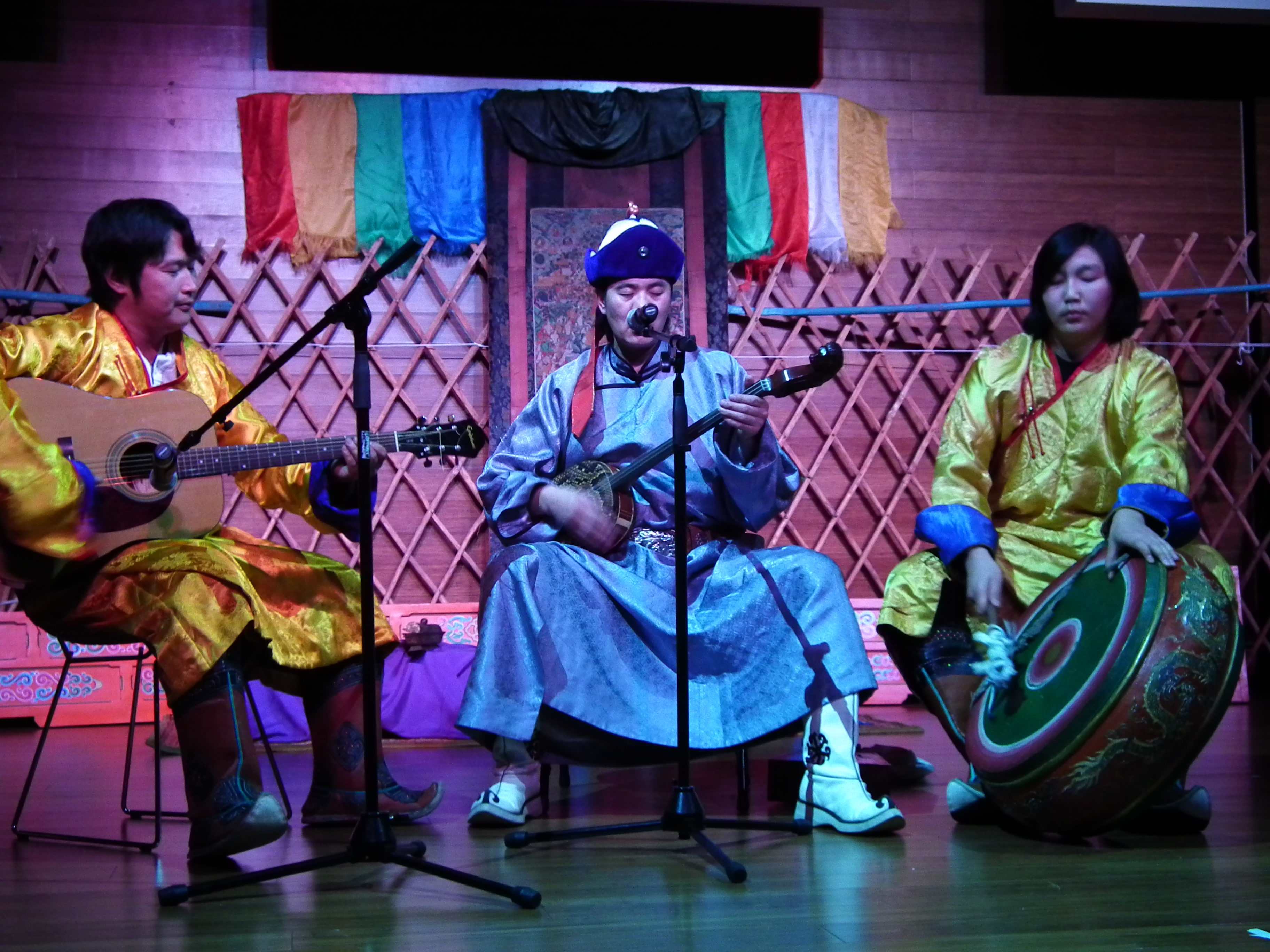 Hamtdaa Mongolian Arts Culture Masks - 0176